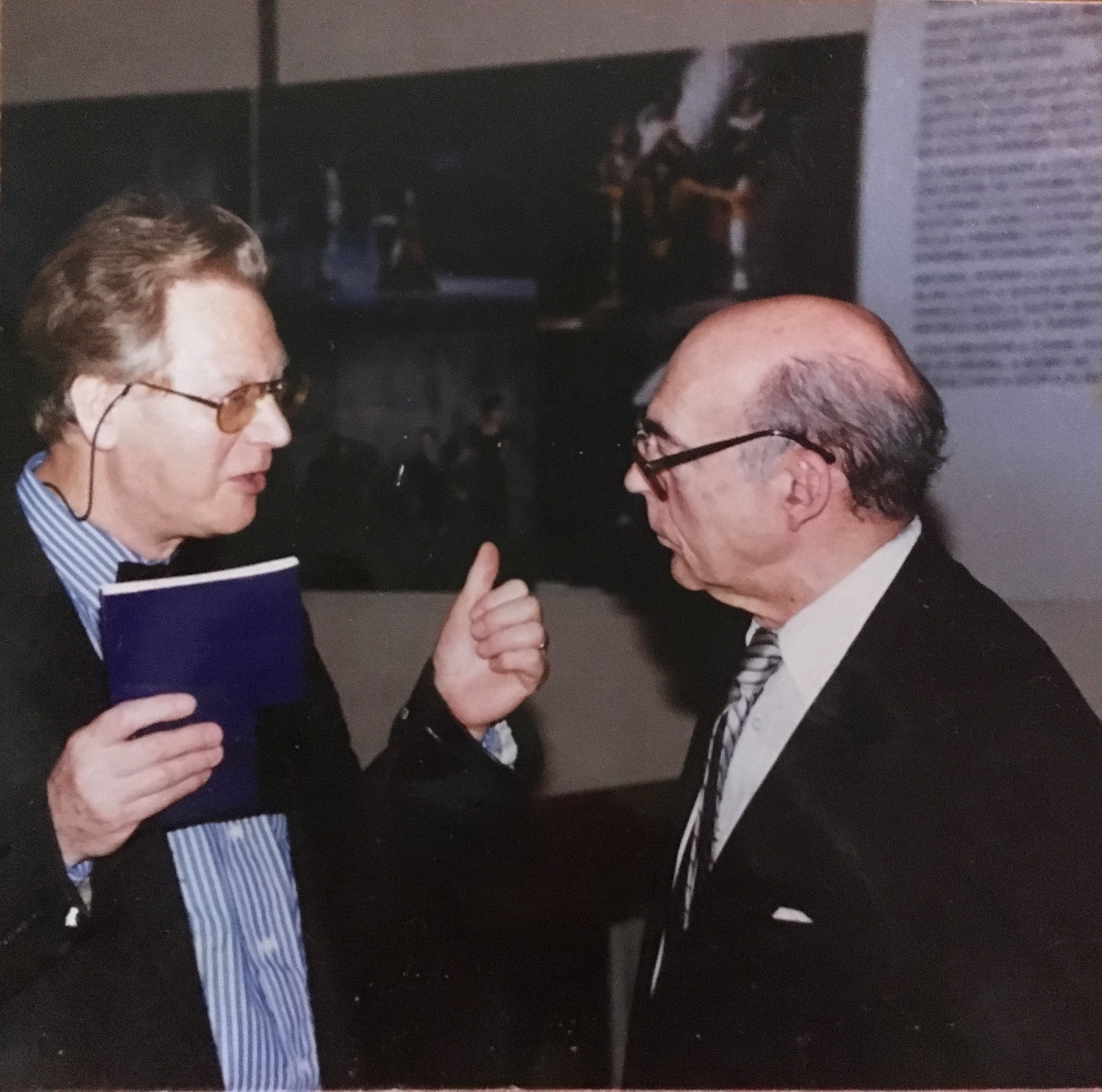 Photo prise au Théâtre de la Ville (Paris, FRANCE) le 25 mars 1995